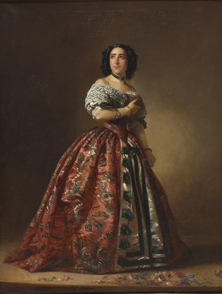 La obra representa a la actriz española Teodora Lamadrid (1820-1896), caracterizada para interpretar el papel de Adriana Lecouvreur.